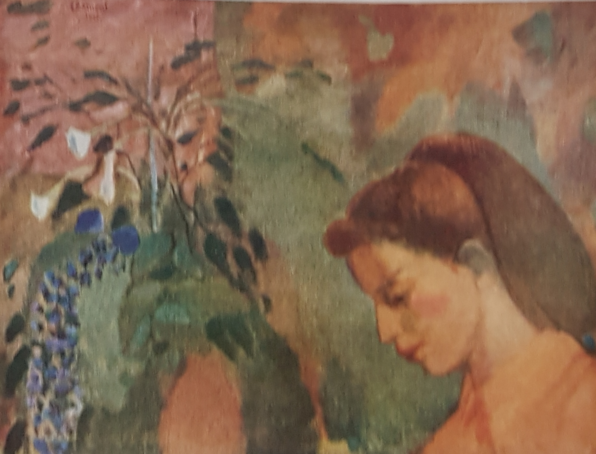 Målningen Aili med blommor utförd av Curt Clemens, avfotograferad bild från Allhems Svenskt konstnärslexikon.